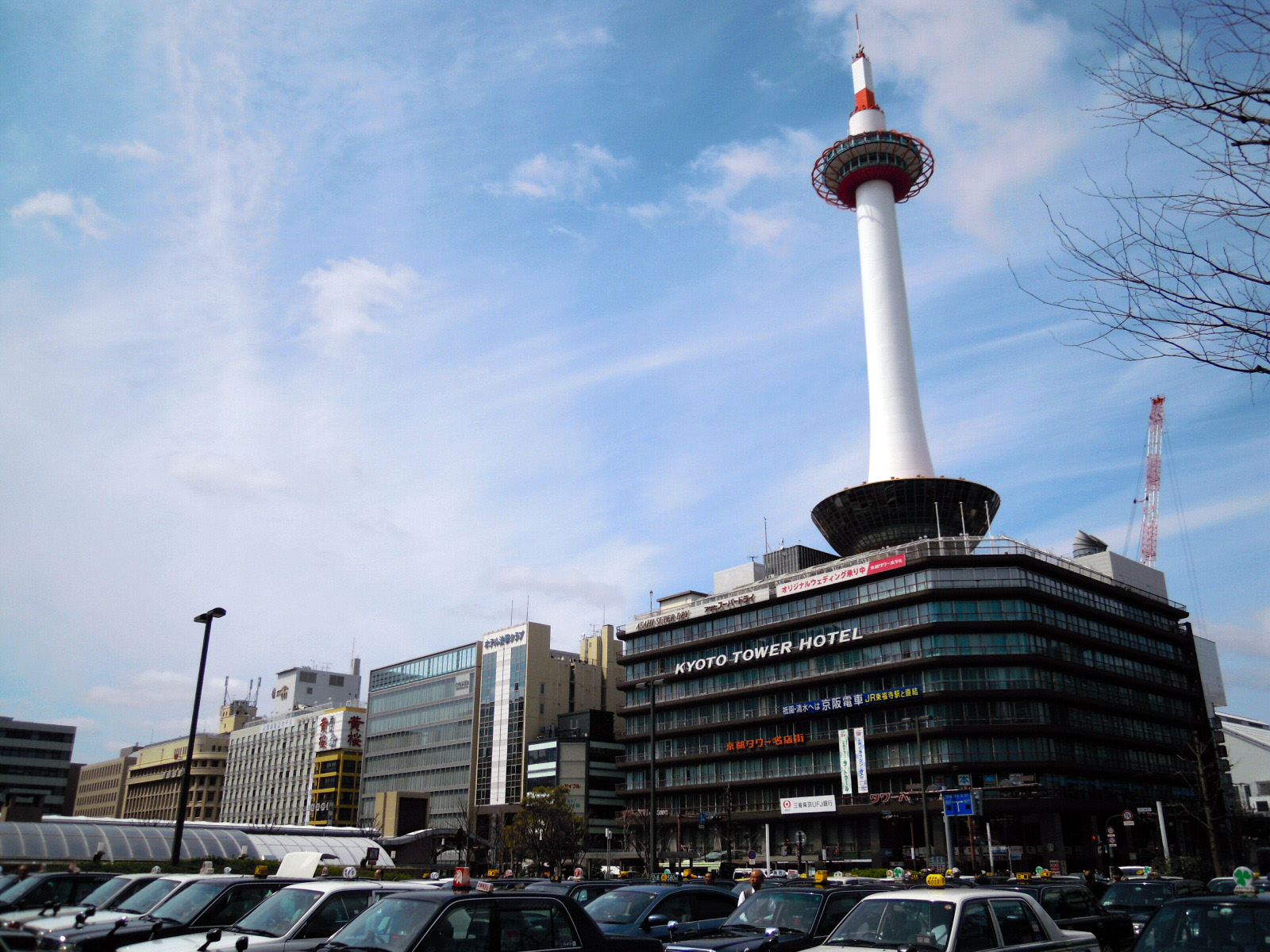 Kyoto tower